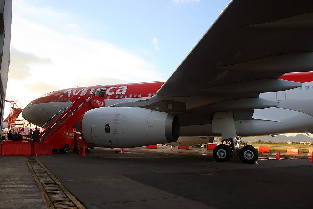 Vista lateral del primer Airbus A330 con matrícula N948AC